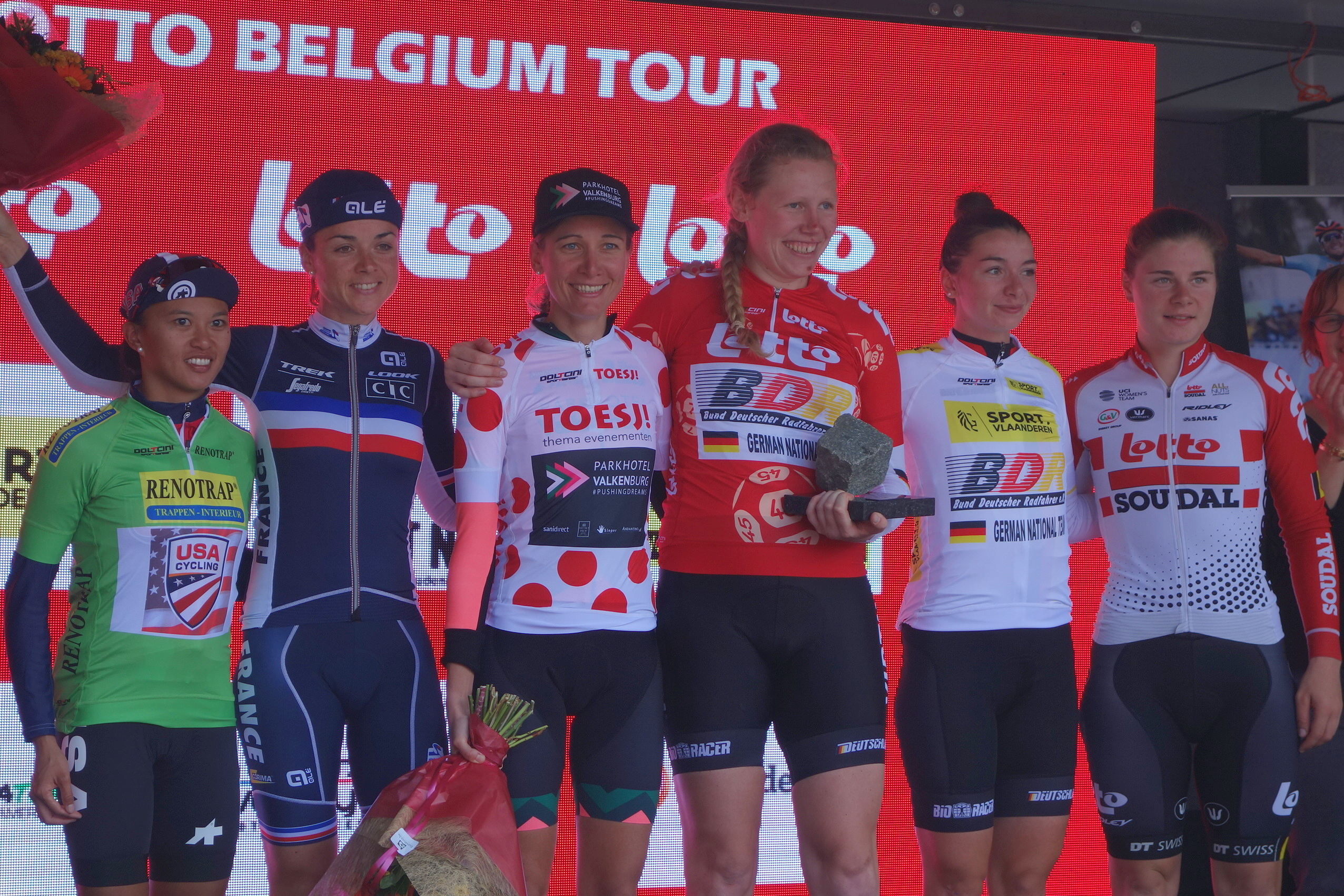 Alle winnaars van de truien op het podium na de laatste etappe in Geraardsbergen van de Lotto Belgium Tour 2019